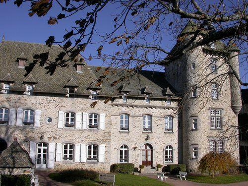 Chateau de Motsalvy (15) appartenait à Noël Delmas